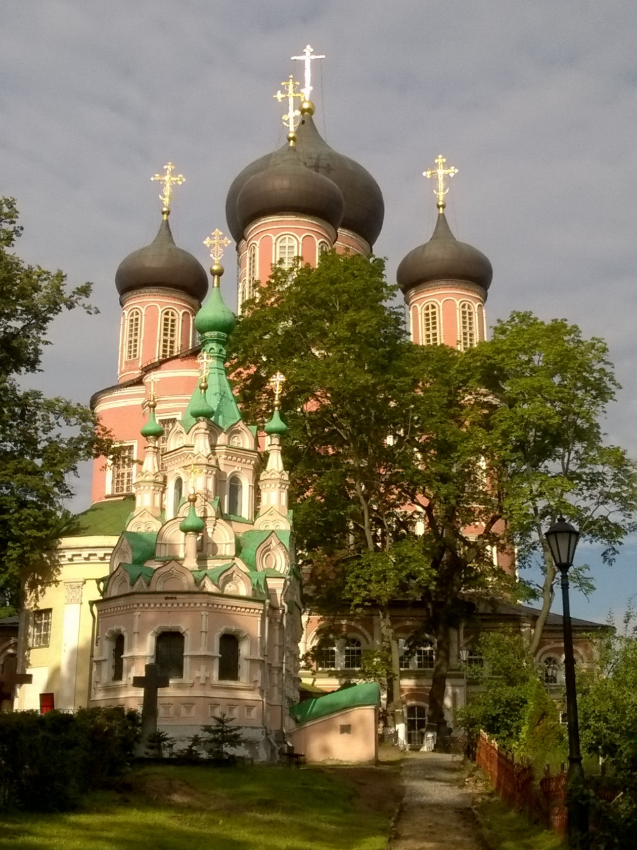 Le monastère Donskoï le 25/07/2017 au matin